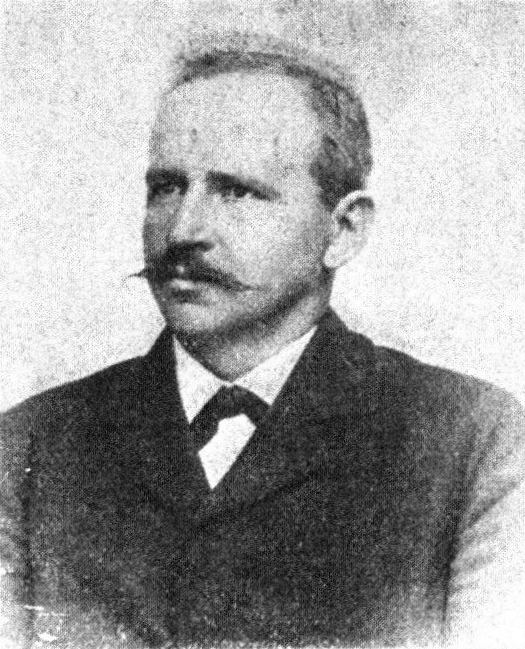 Österreichischer Politiker, Reichsratswahl 1907, Name siehe Dateiname